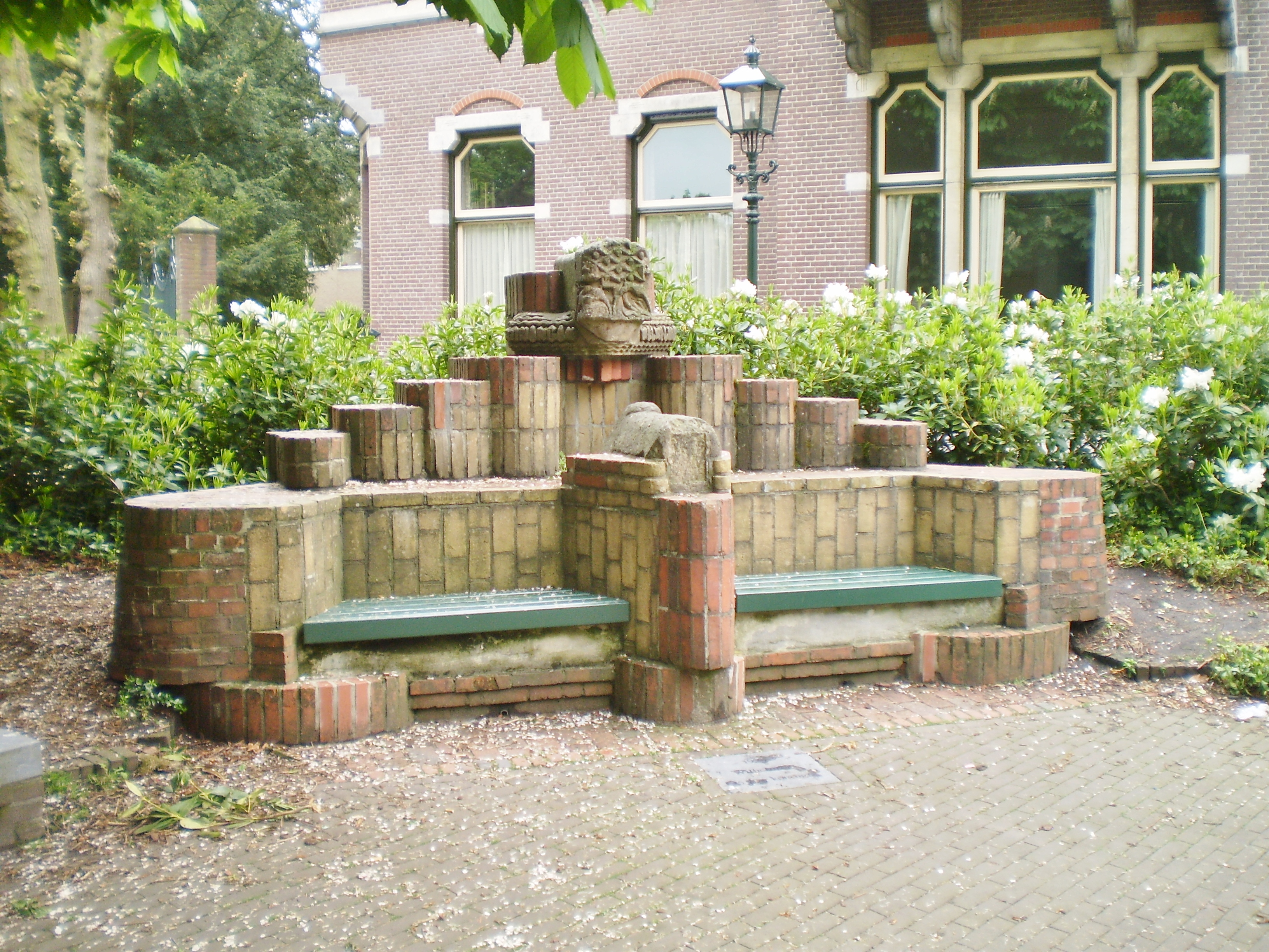 Op de achtergrond het oude gemeentehuis